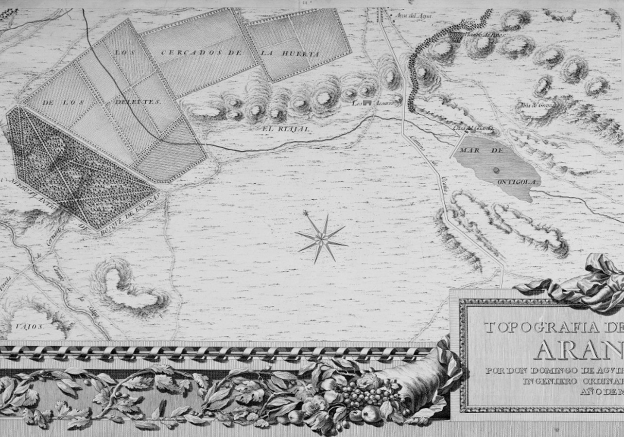 "Topografía del Real Sitio de Aranjuez por D. Domingo de Aguirre" (1775). Detalle de la parte meridional, donde puede verse el embalse del siglo XVI conocido como "Mar de Ontígola". Colección de la Biblioteca Nacional de España.